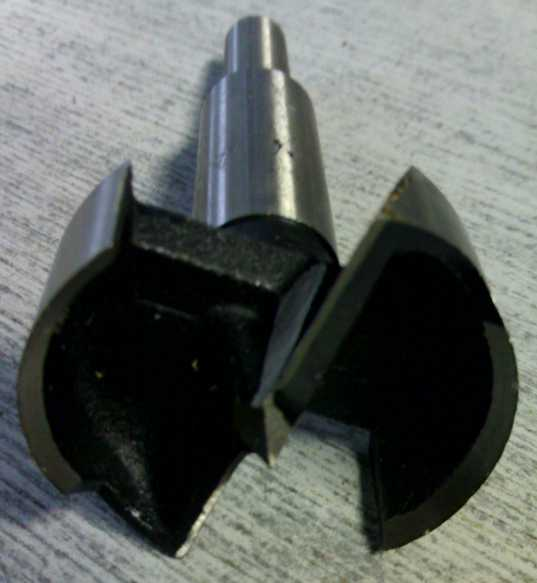 Forstner drill bit